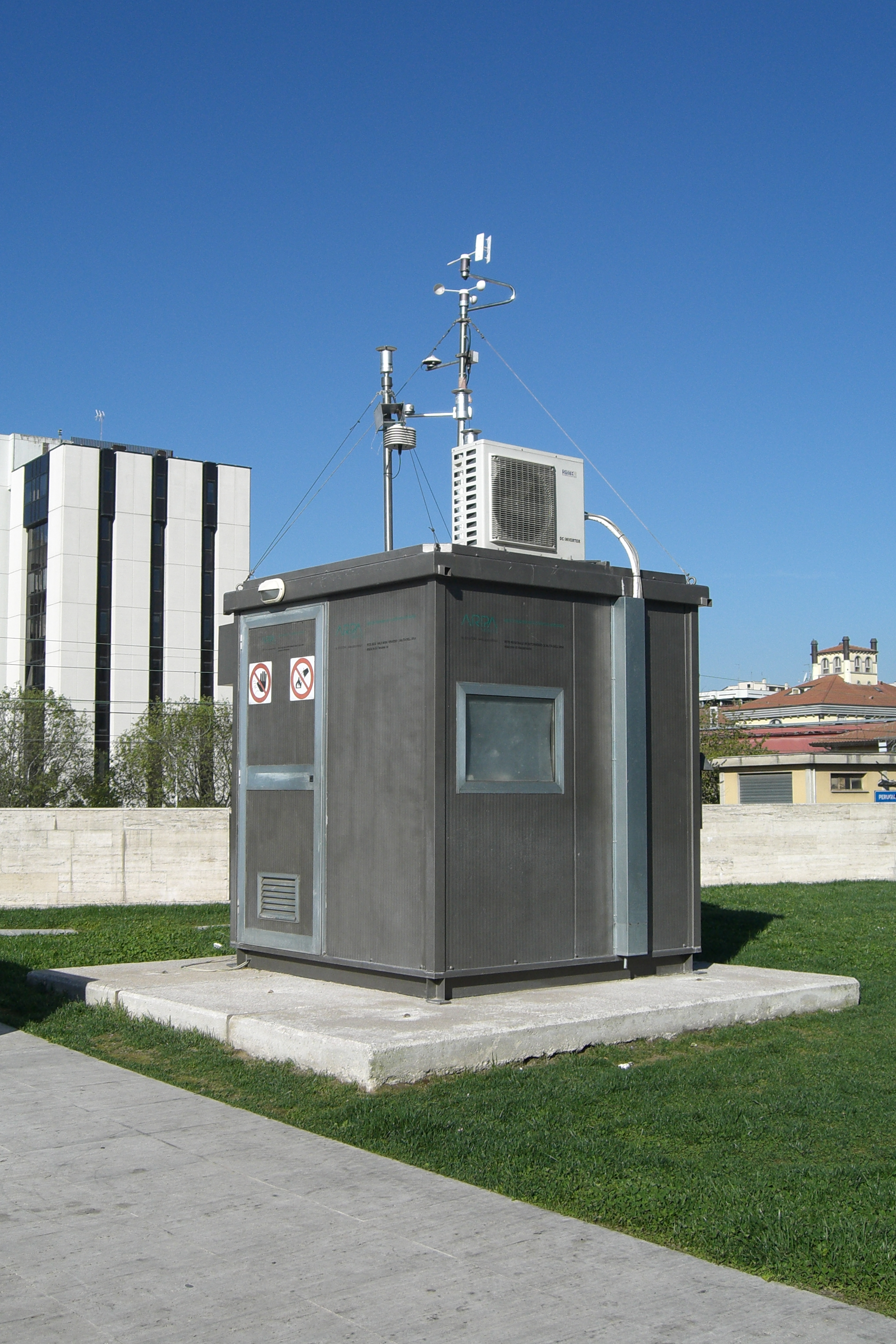 Automatic air quality monitoring station, owned by Agenzia Regionale per la Protezione Ambientale dell'Umbria (ARPA Umbria). Fontivegge District, Perugia, 10 April 2012.